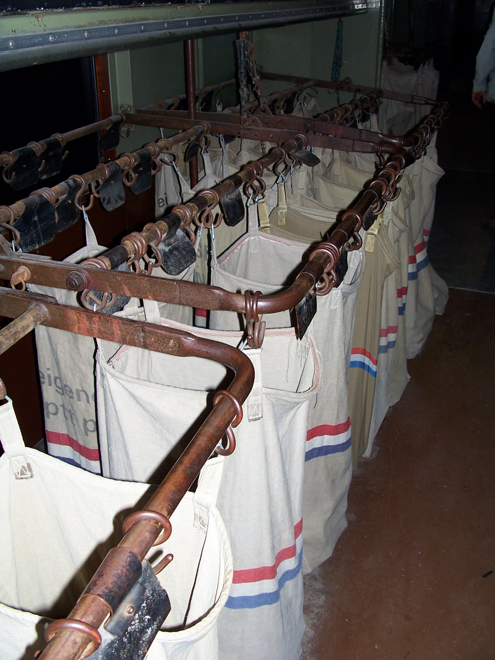 Self made picture.